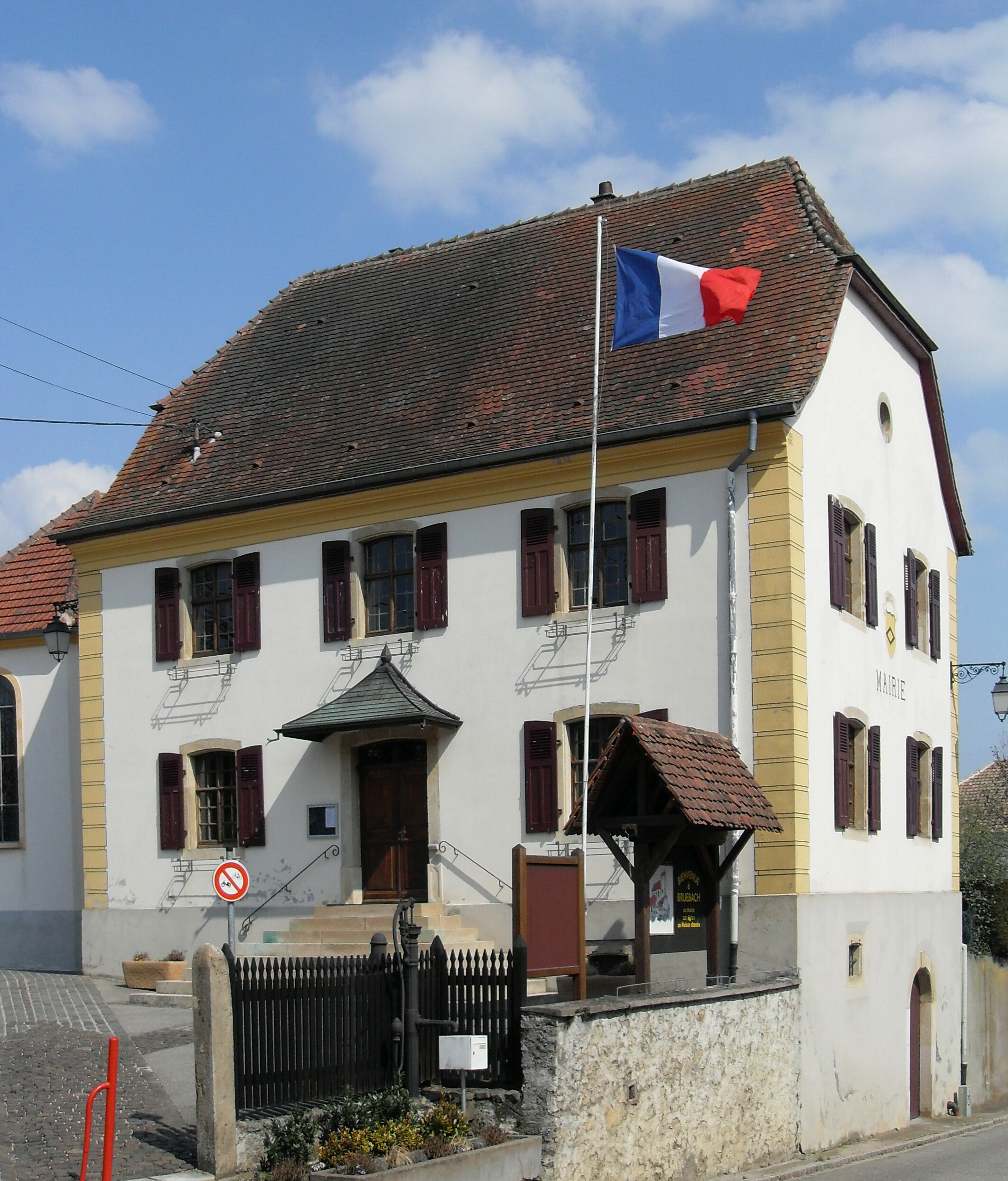 La mairie de Bruebach